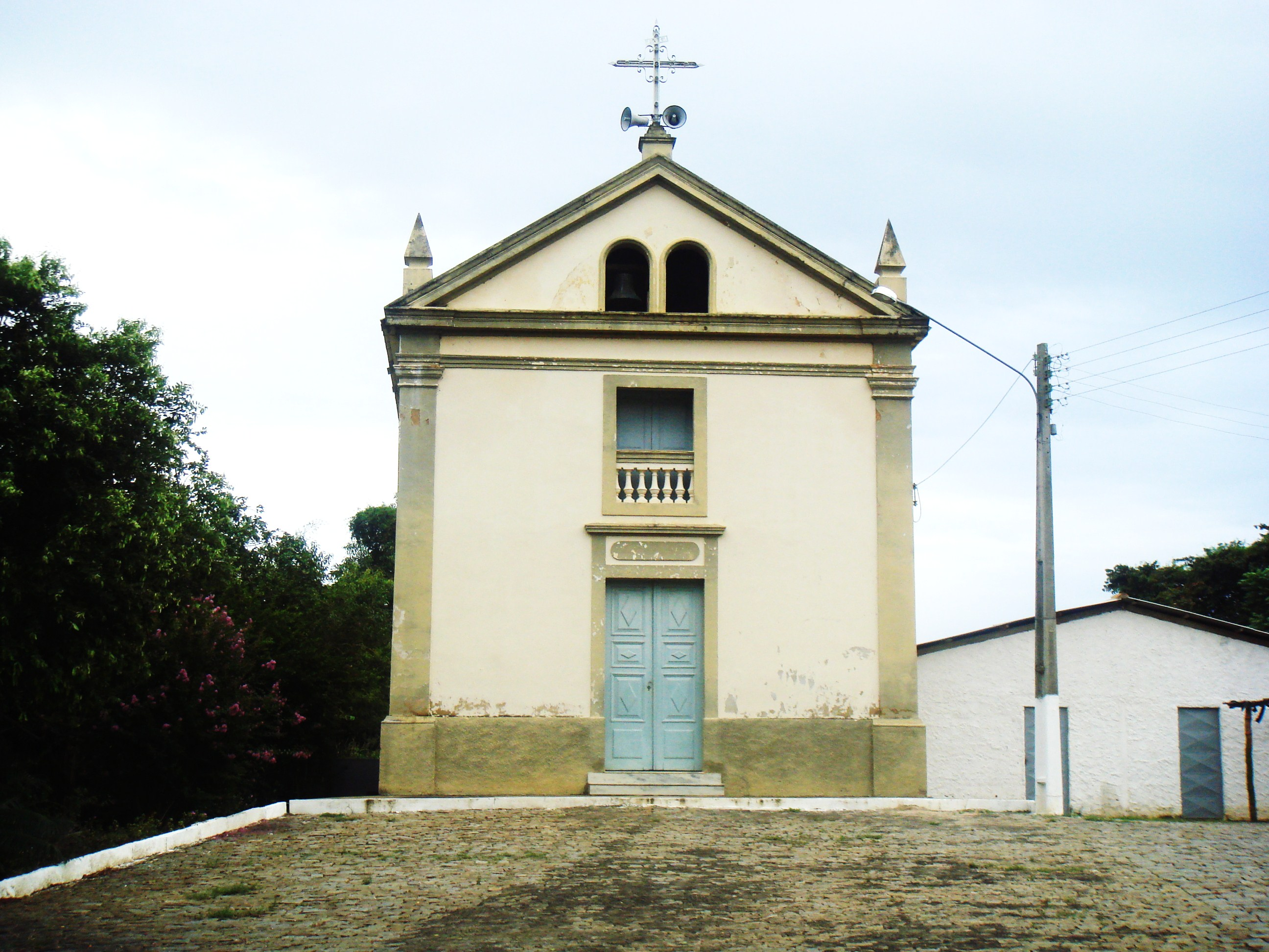 Capela de Santo Antônio, símbolo na fundação de Três Irmãos